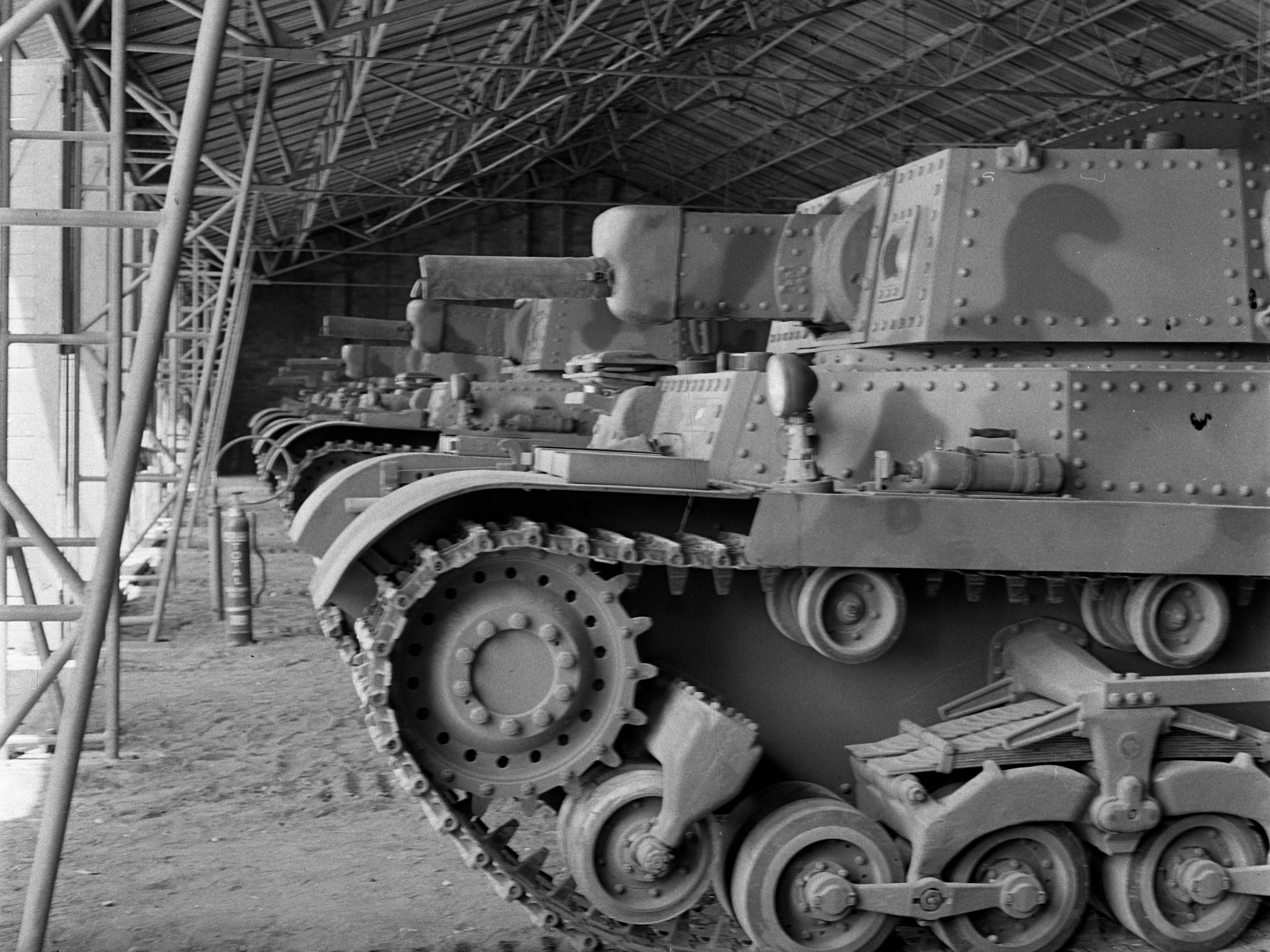 Mátyásföld, Újszász utca 41-43. Magyar Királyi Honvéd gépkocsiszertár, Turán típusú harckocsik. Location: Hungary, Budapest XVI. Tags: Hungarian brand, tank, camouflage pattern, fire extinguisher, military, Budapest Title: Mátyásföld, Újszász utca 41-43. Magyar Királyi Honvéd gépkocsiszertár, Turán típusú harckocsik.